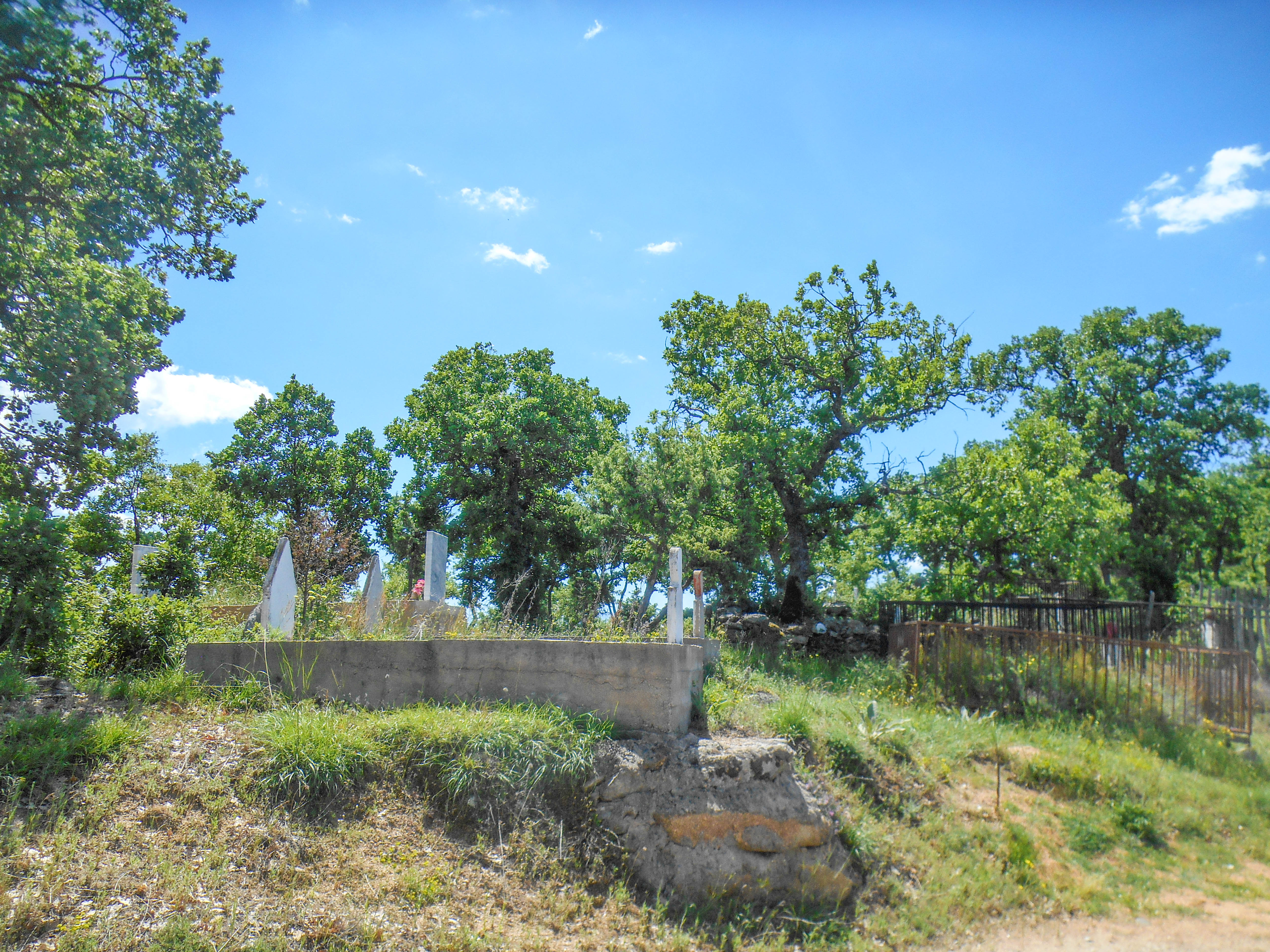 Висока Маала